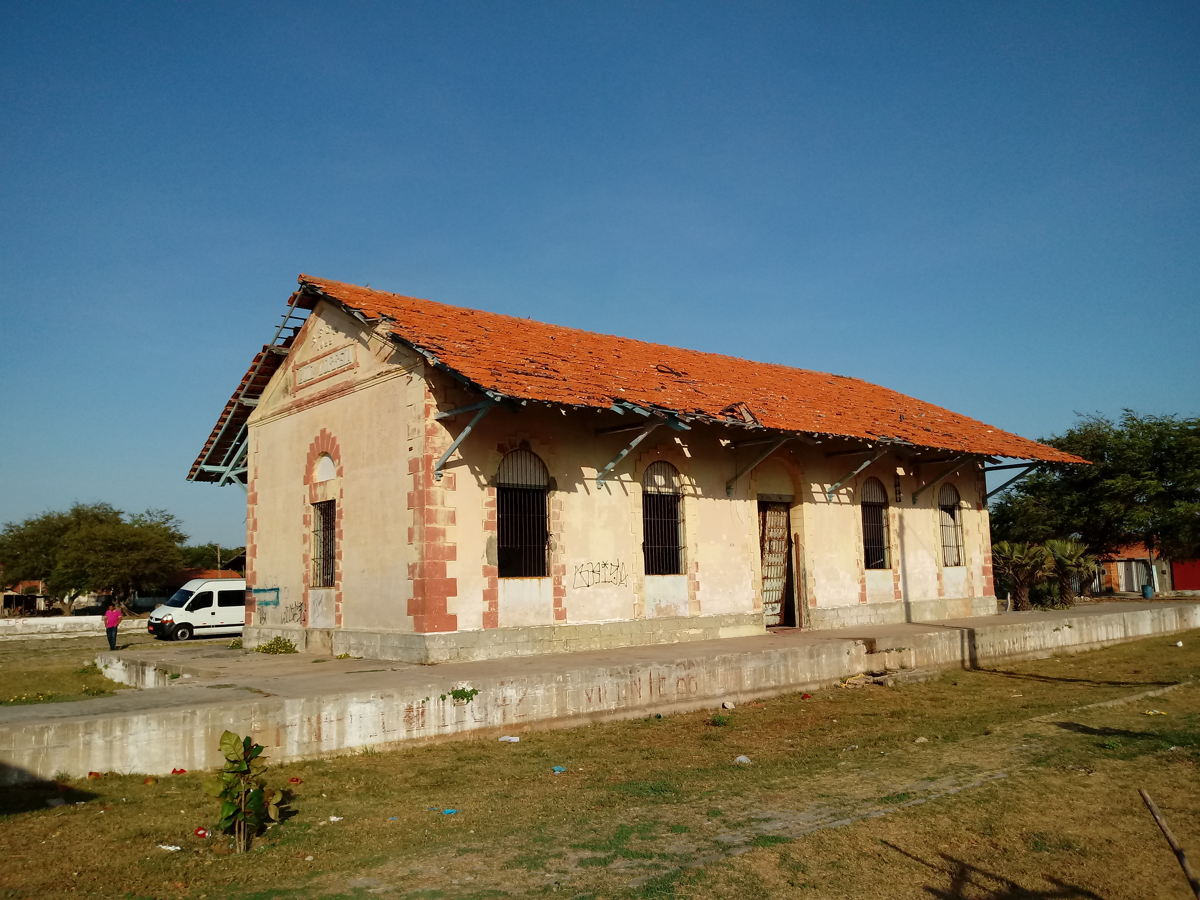 Laterais da Estação Ferroviária de Luís Correia.